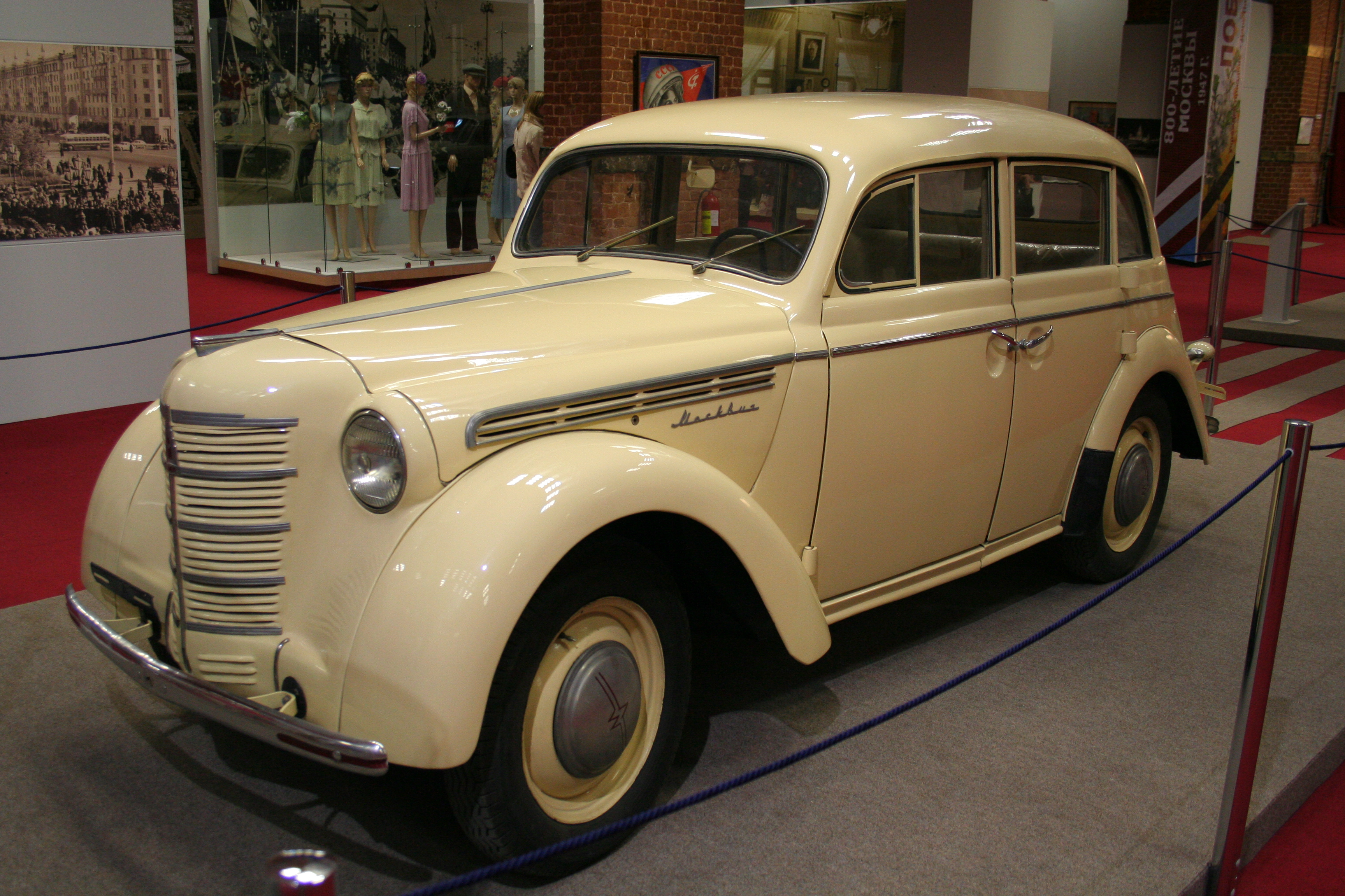 Москвич-400 в Музее Москвы в бывших Провиантских складах.